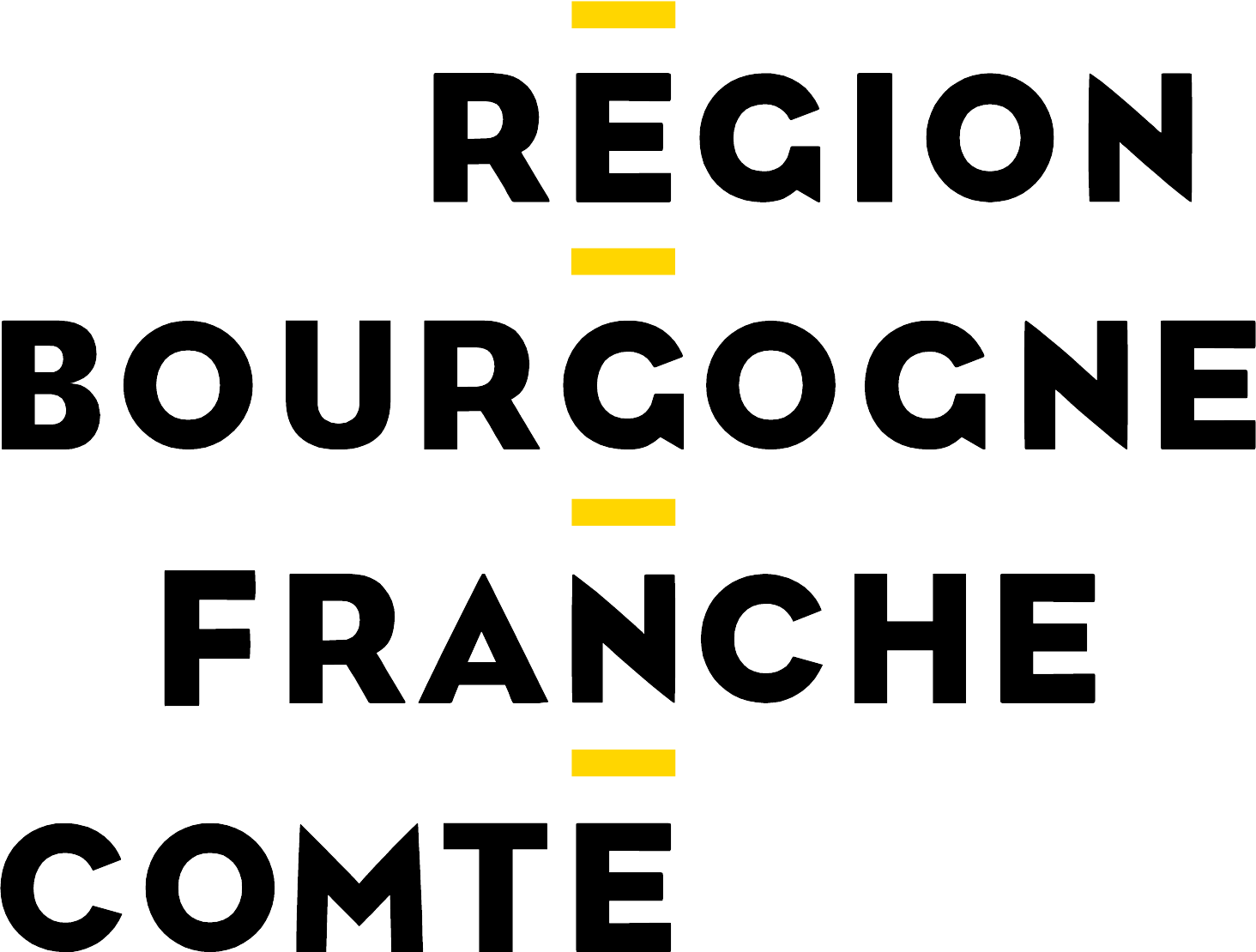 Logo de la région Bourgogne-Franche-Comté.